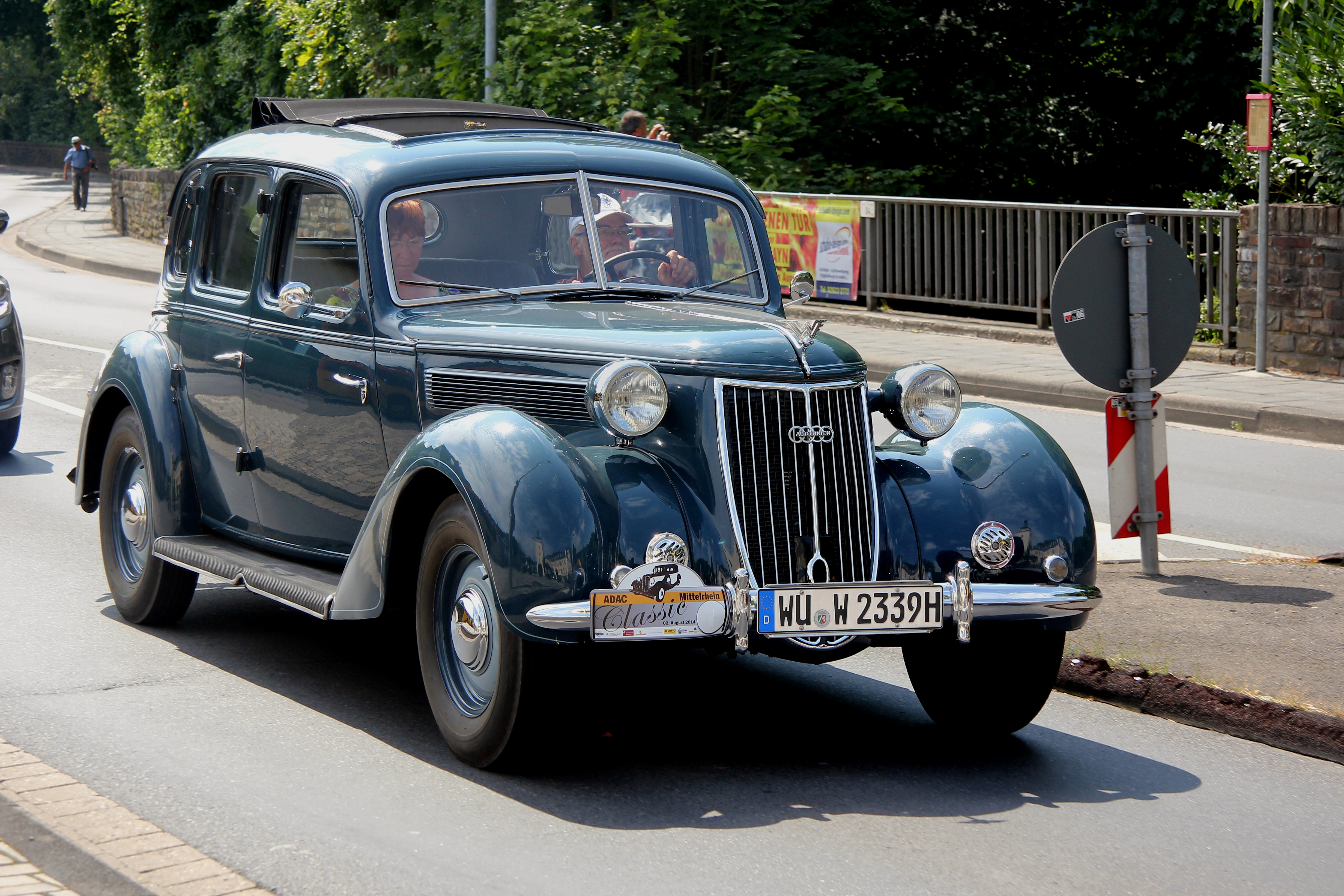 Wanderer W 23, Baujahr 1939, bei der ADAC Mittelrhein Classic 2014 in Sayn (Kennzeichen des Fahrzeugs verändert); 6-Zylinder-Motor, 2632 cm³, 62 PS